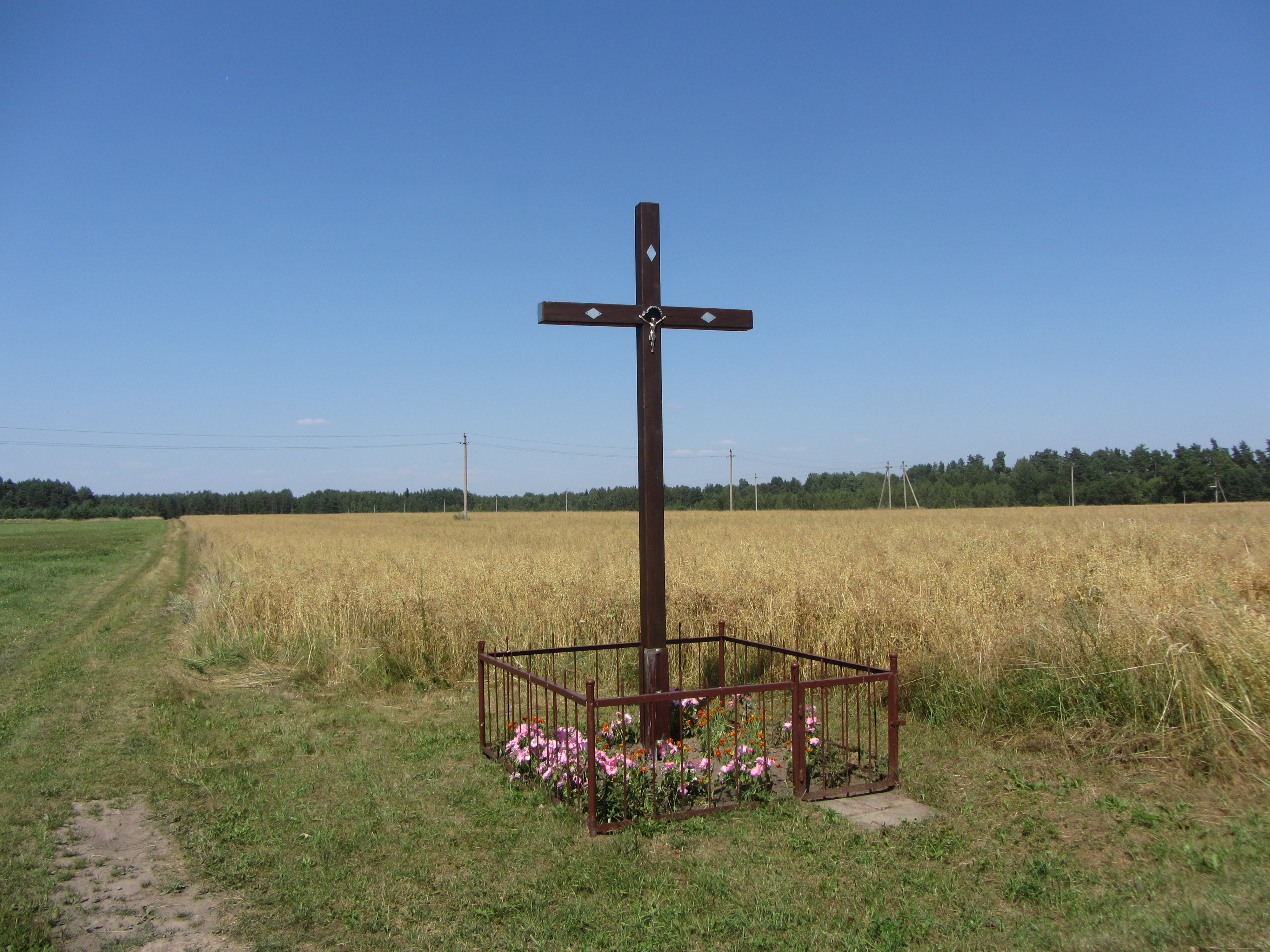 Dainava, Lithuania